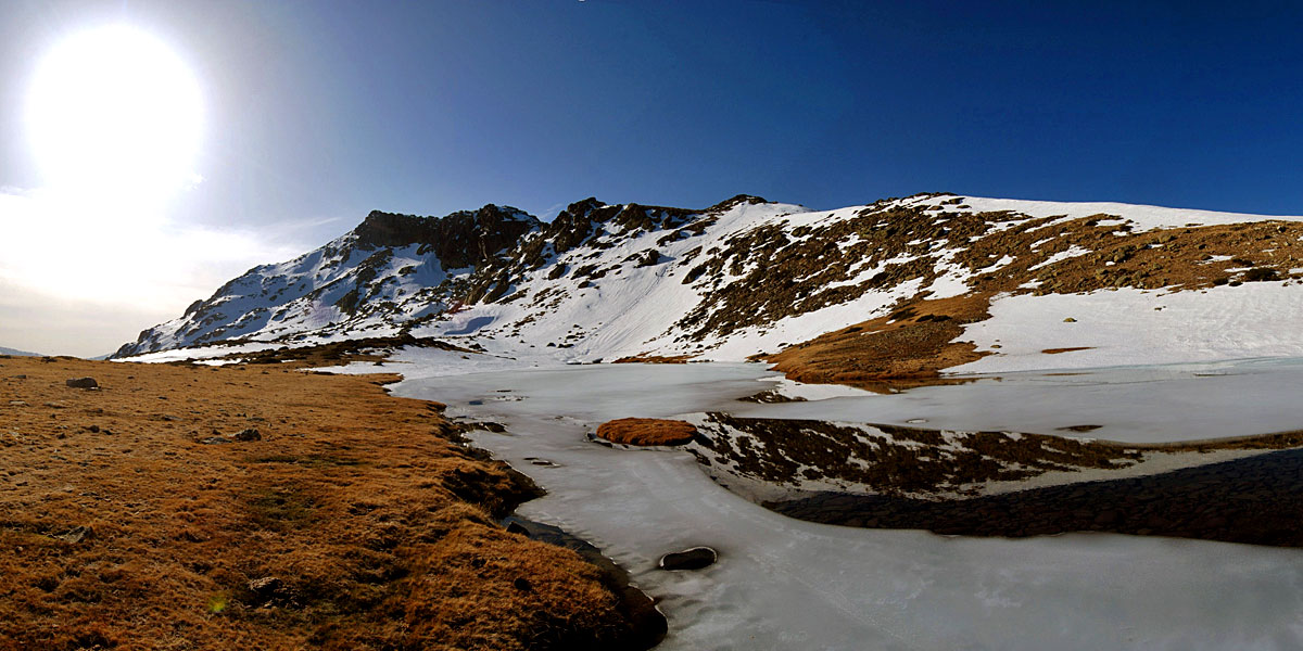 Laguna de los Pájaros y Risco de los Claveles en el macizo de Peñalara. Sierra de Guadarrama